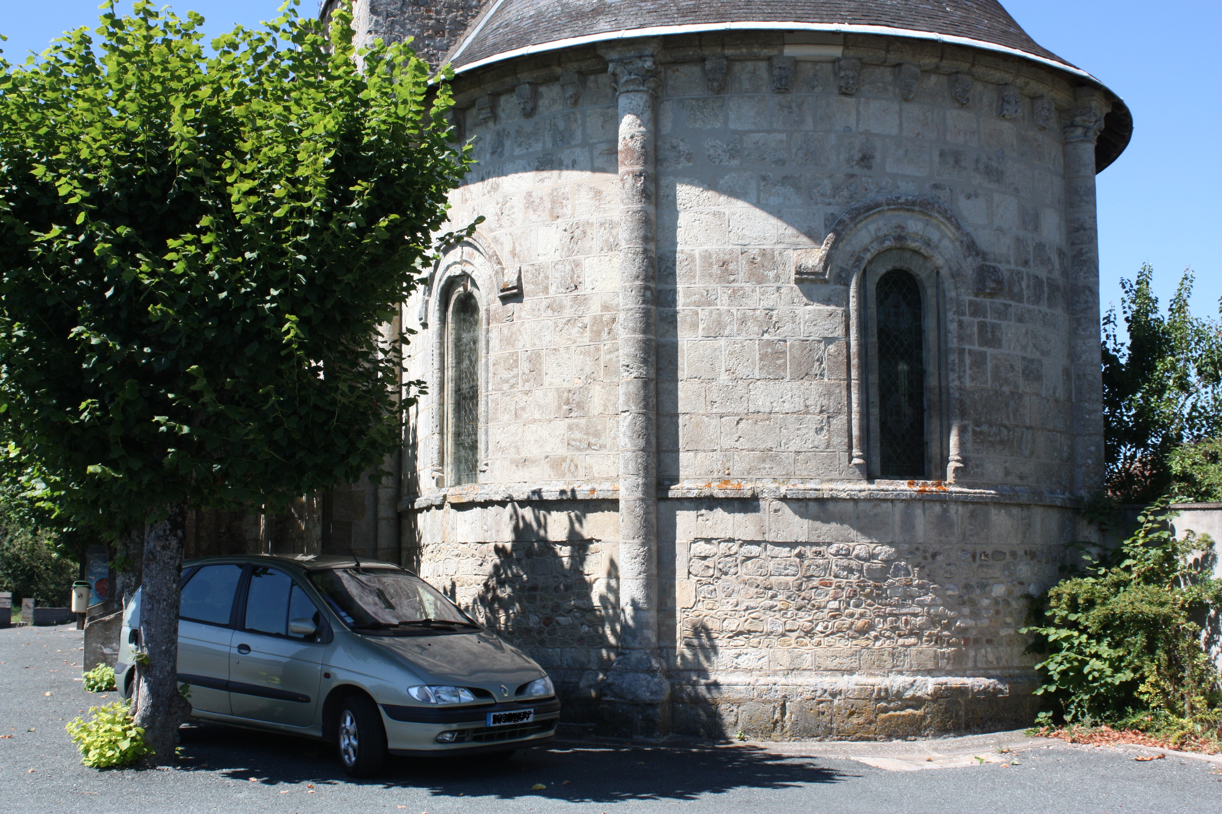 Saint-Loup - Eglise Saint-Loup L'abside